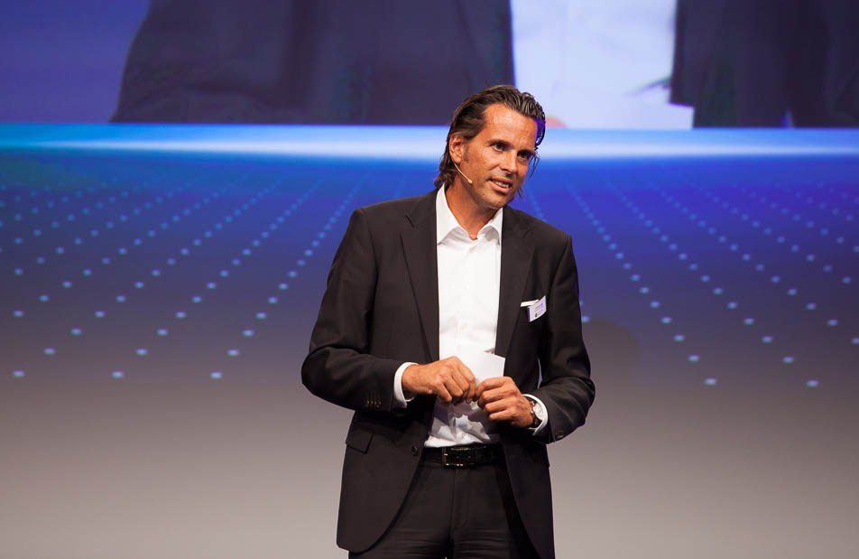 Lutz Schüler, Vorsitzender der Geschäftsführung, Unitymedia KabelBW